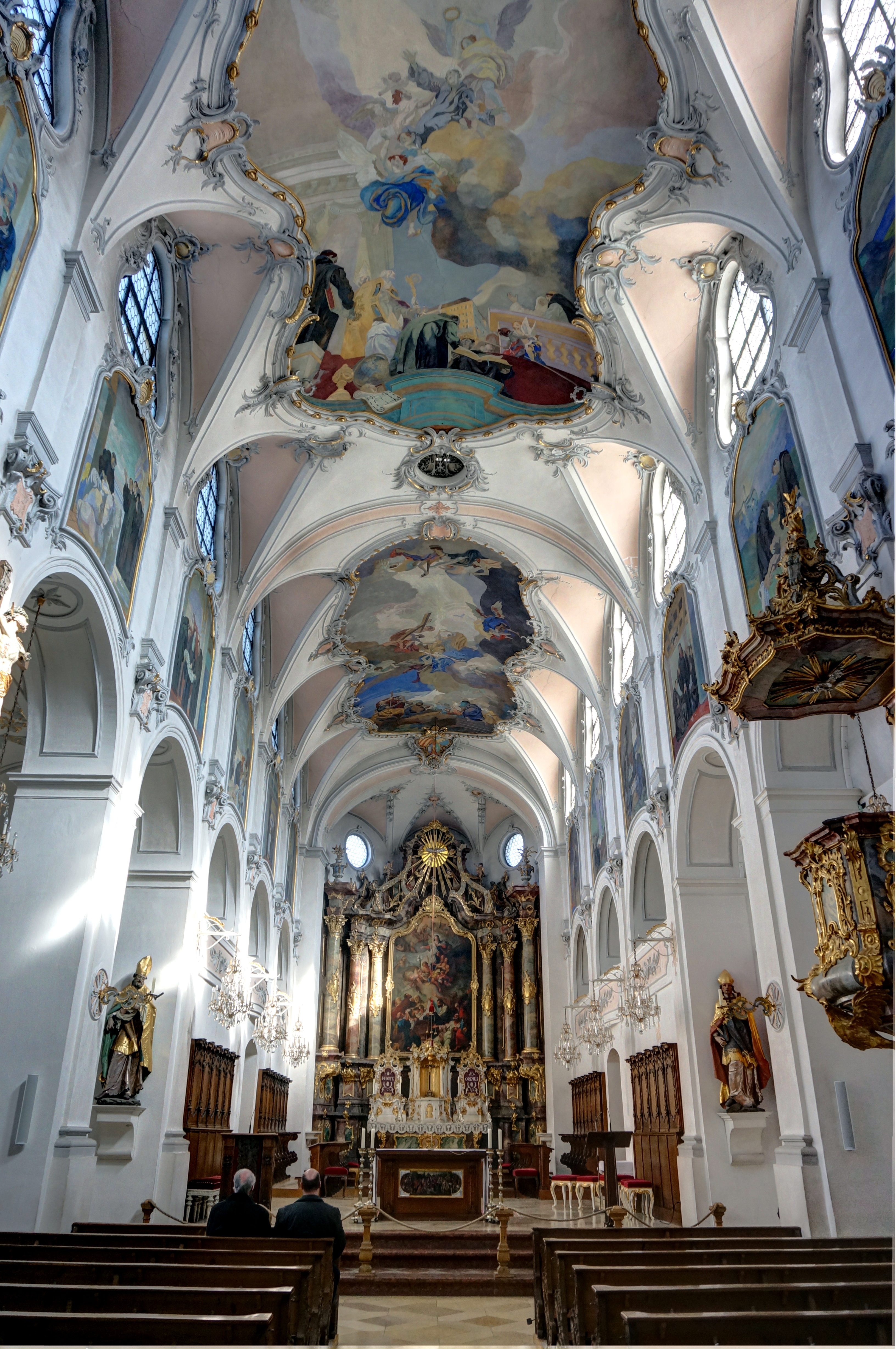 Kloster Scheyern, Klosterkirche zum Heiligen Kreuz, Altarraum